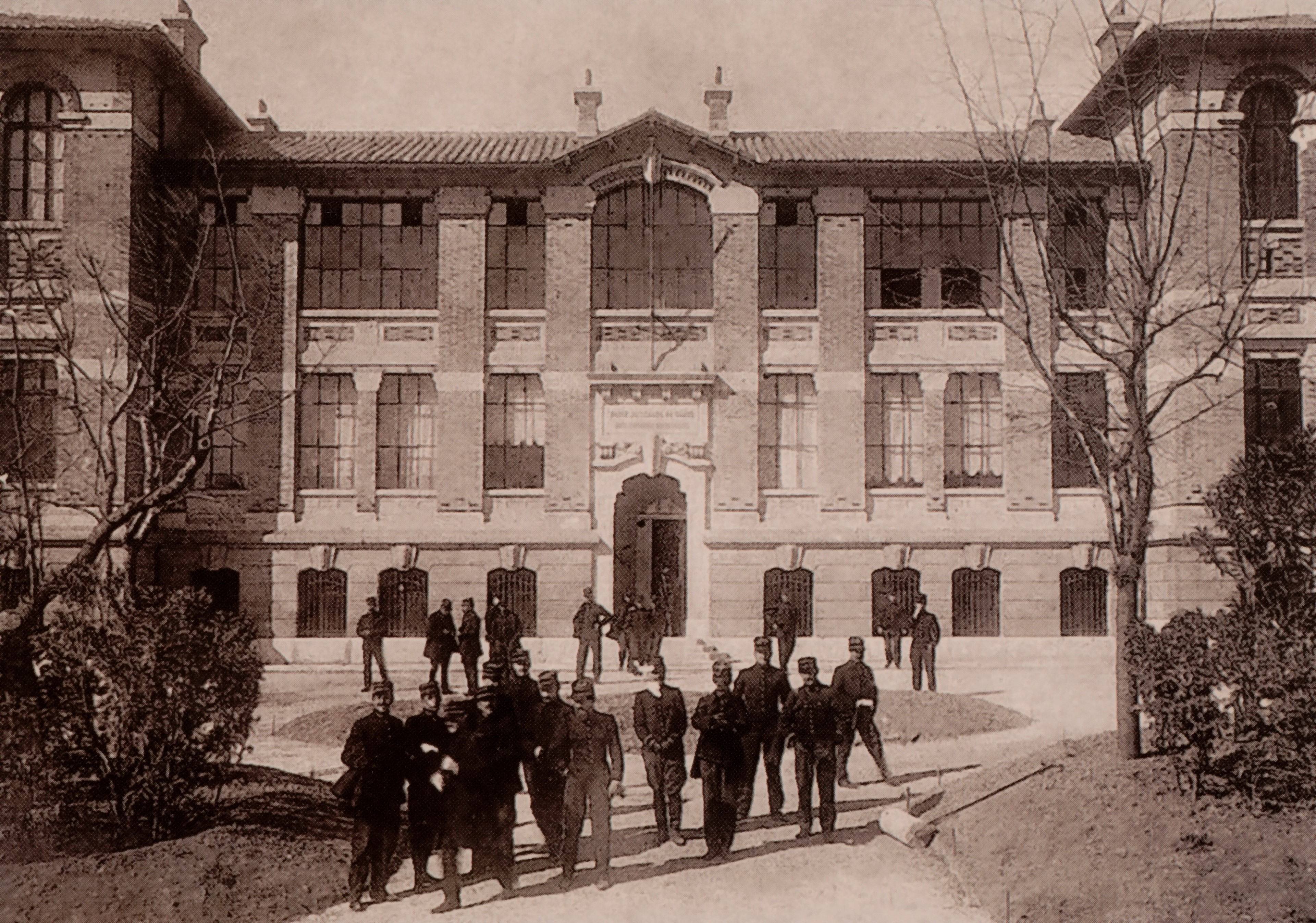 Carte postale de 1907 montrant les élèves de la première promotion de l'école du Pharo devant le bâtiment principal